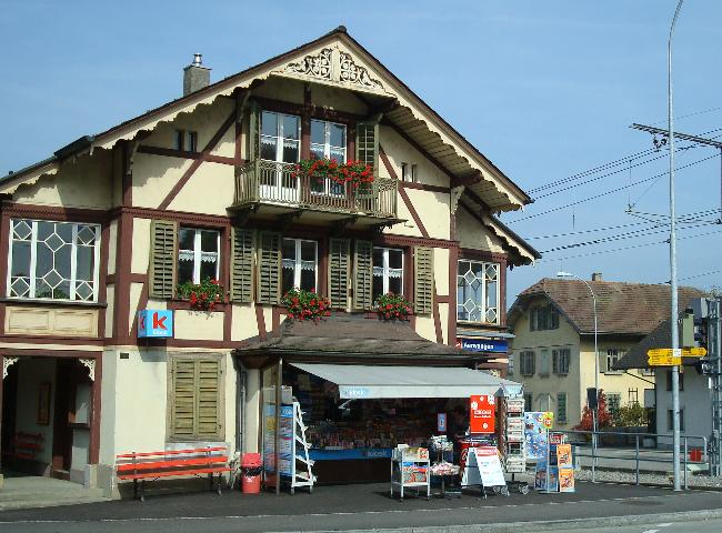 Front des historischen Stationsgebäude Aarwangen der Aare Seeland mobil (ASm) auf der Strecke Langenthal - Niederbipp (- Oensingen) mit Baujahr 1907.